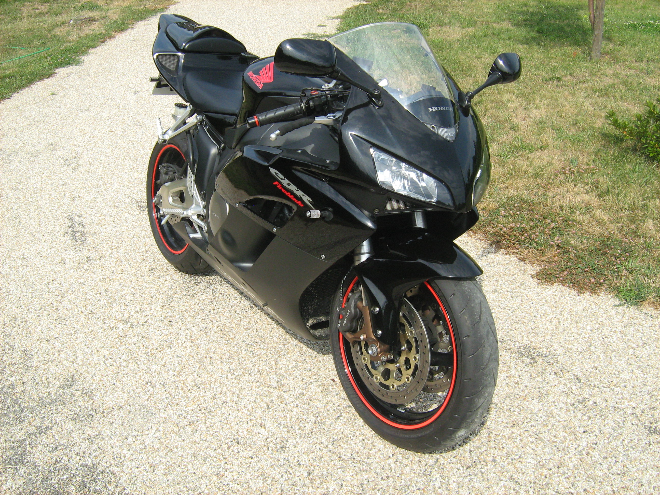 CBR 1000RR année 2005 - couleur Noir (avec sabot noir métallique Gunpowder mat)